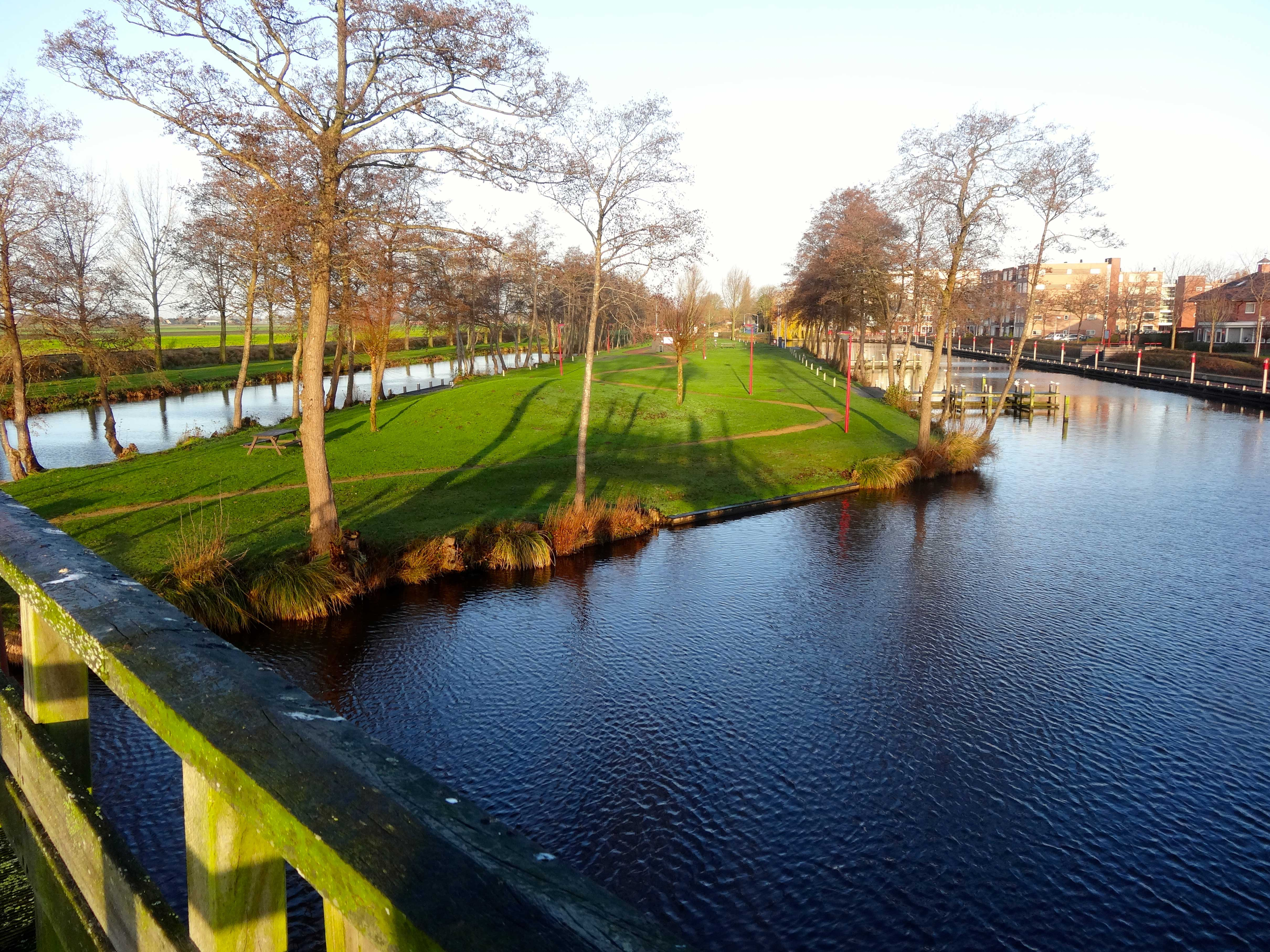 Het Spoordok in Musselkanaal